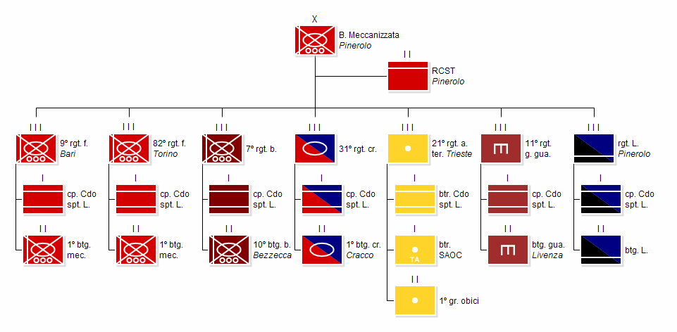 Attuale struttura della Brigata Meccanizzata "Pinerolo"